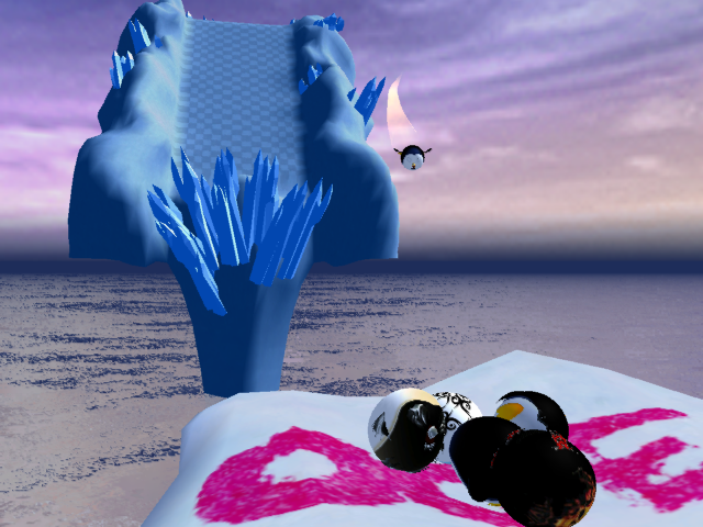 Capture d'écran d'une partie de Mtp Target